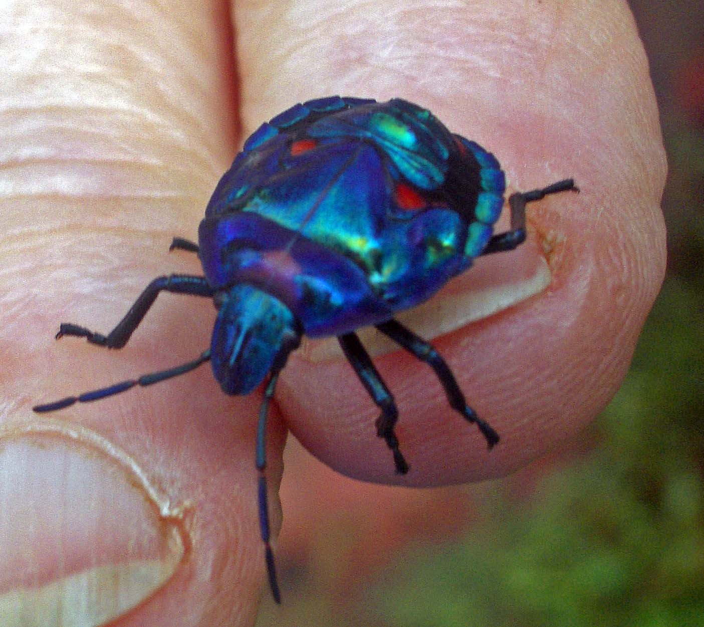 unidentified jewel beetle True bug (Heteroptera) --dysmorodrepanis